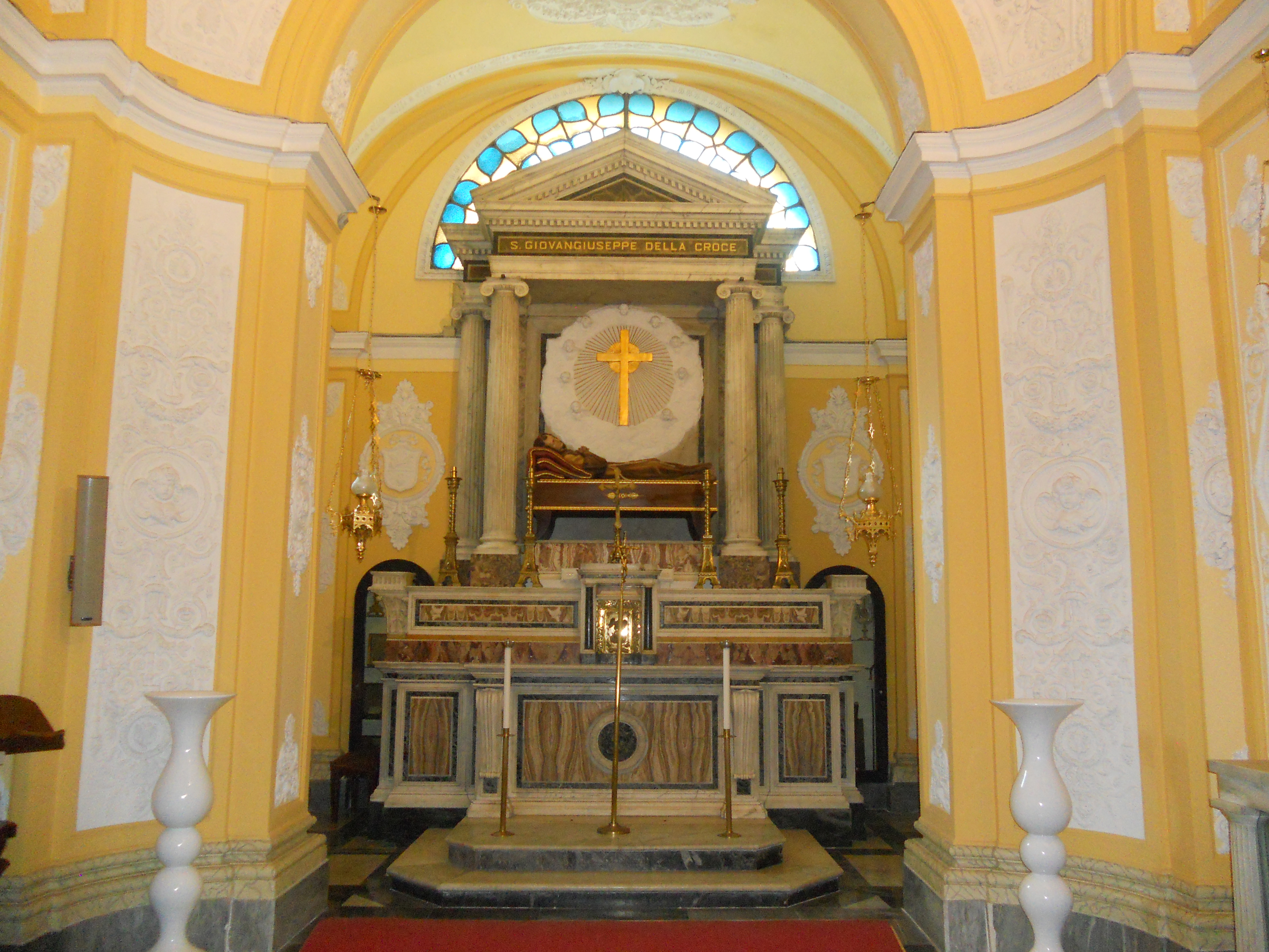 Chiesa del Complesso di Santa Lucia al Monte (Napoli)